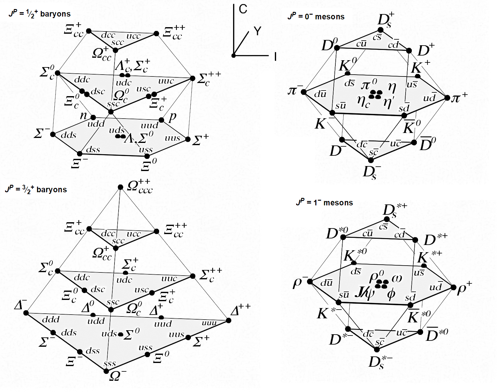 强子谱的表示